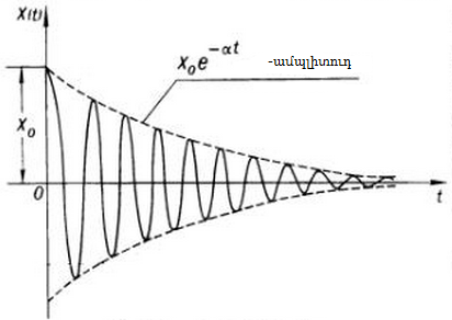 Մարող տատանումներ